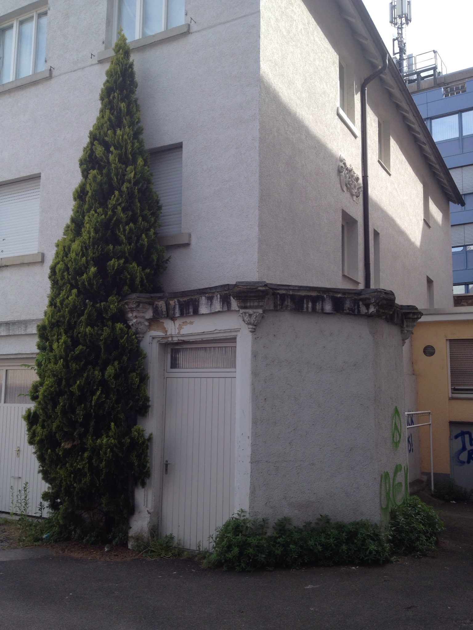 Ehem. Villa Schliz (Hohe Straße) in Heilbronn, Haus an der Siebeneichgasse, in dem Reste der Villa aufgegangen sind